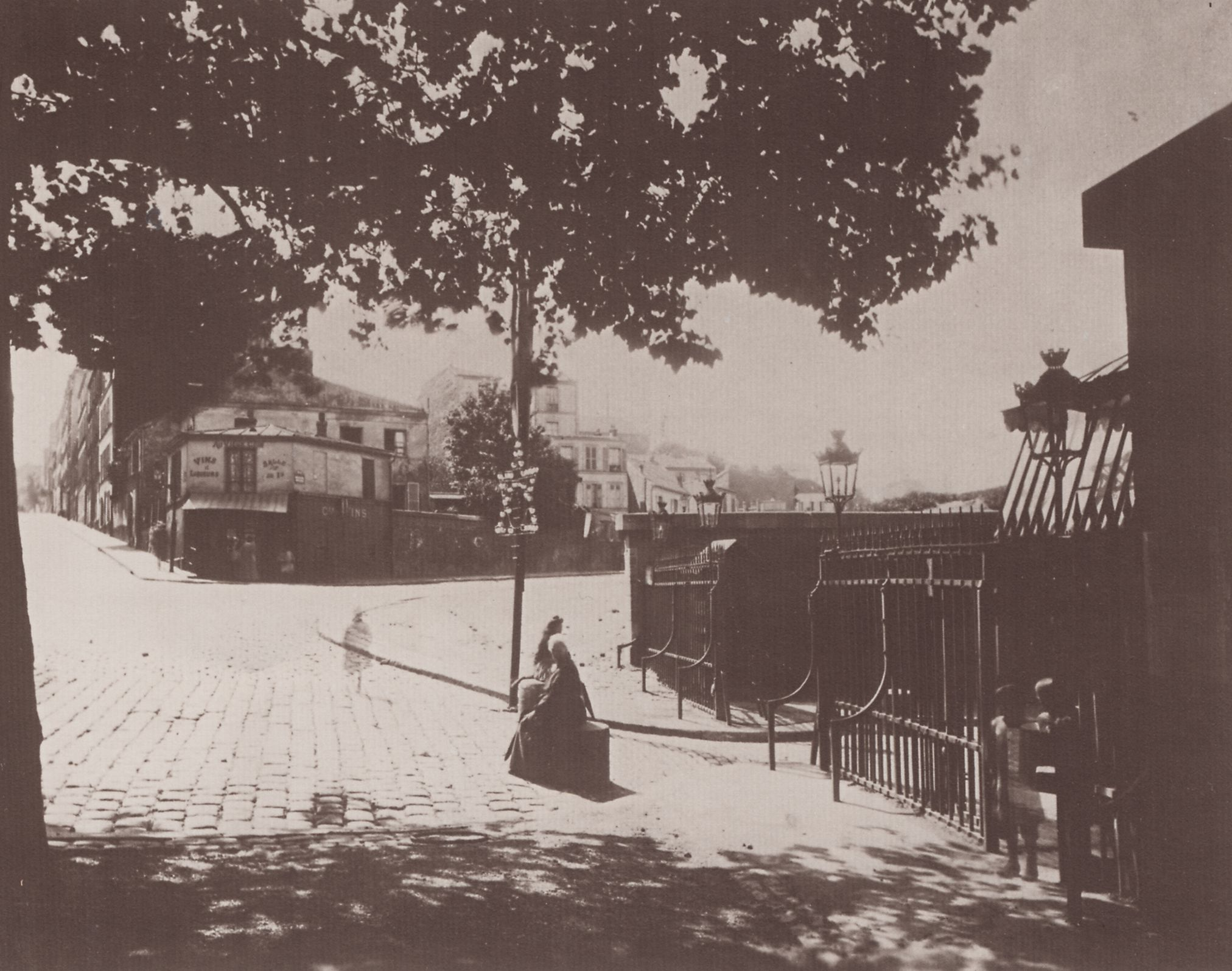 Atget, Eugène: Befestigungsanlagen, Porte du Pré Saint-Gervais